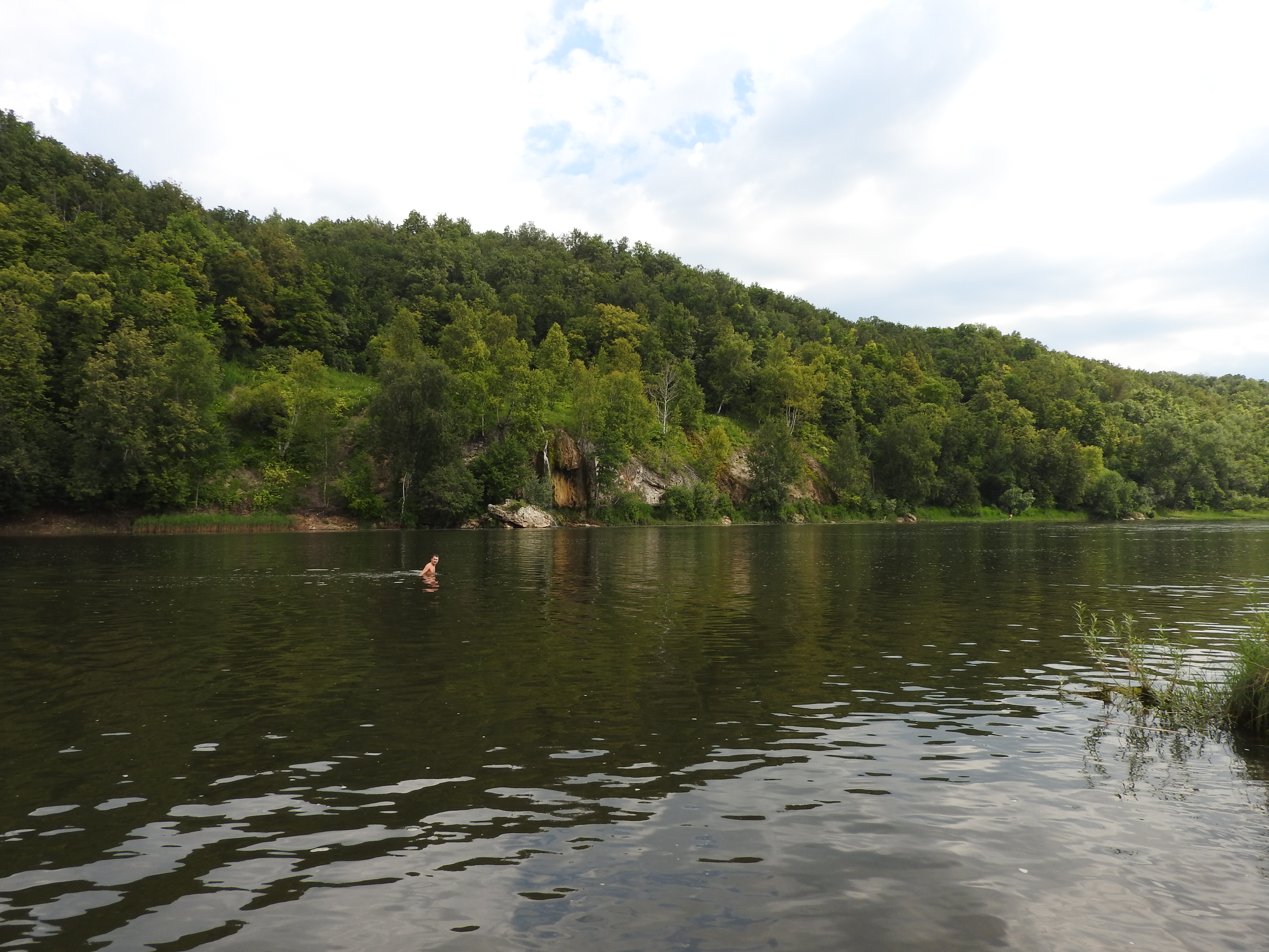 Река Инзер